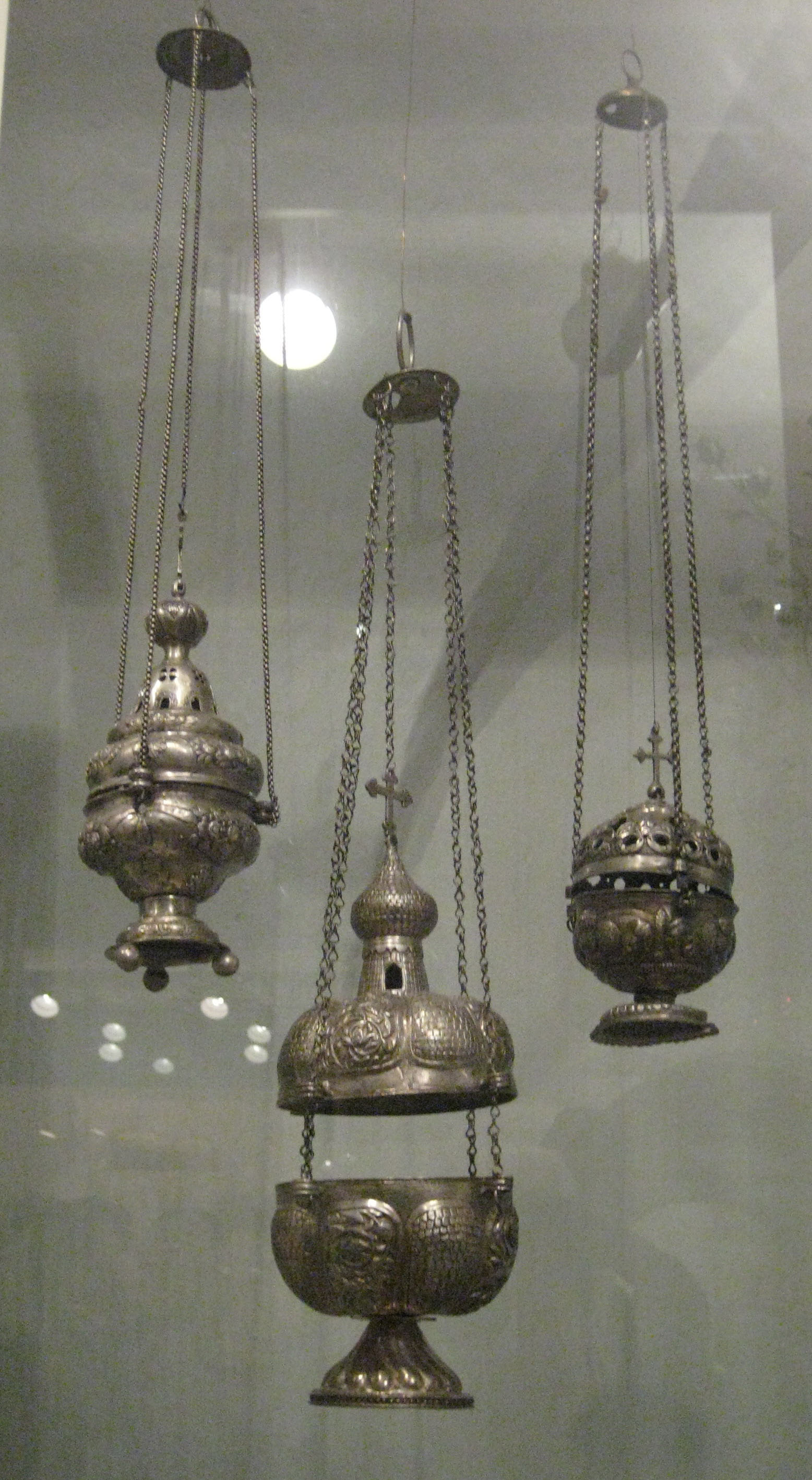 Thuribles. Кадило. Псковский музей. Pskov. XVII-XVIII c.